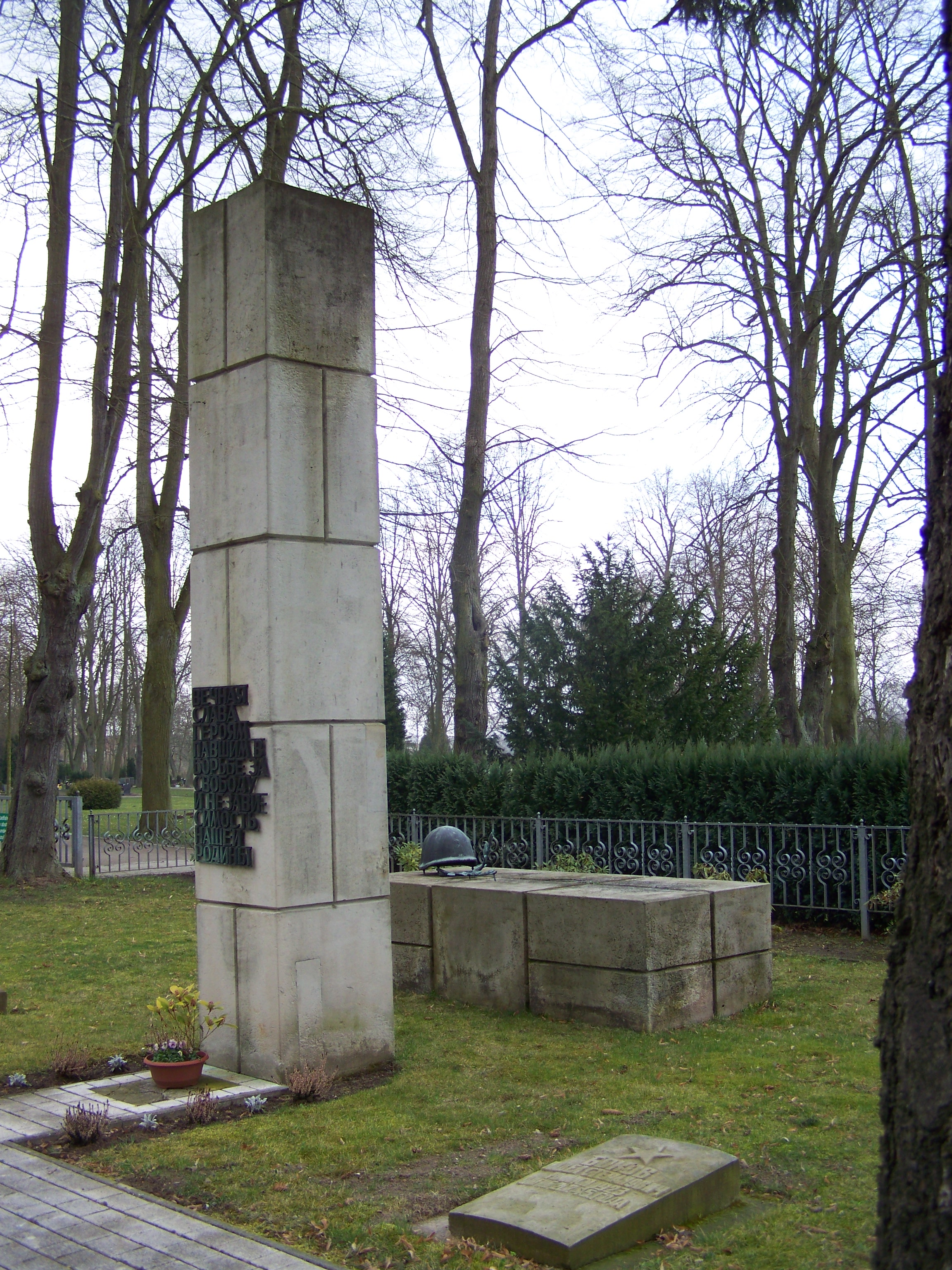 Grimmen,_Gedenksäule_und_-stein_Sowjetsoldaten